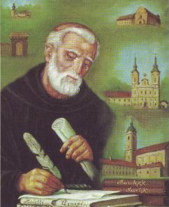 Hungarian monk and scientist Didák Kelemen (1683-1744)